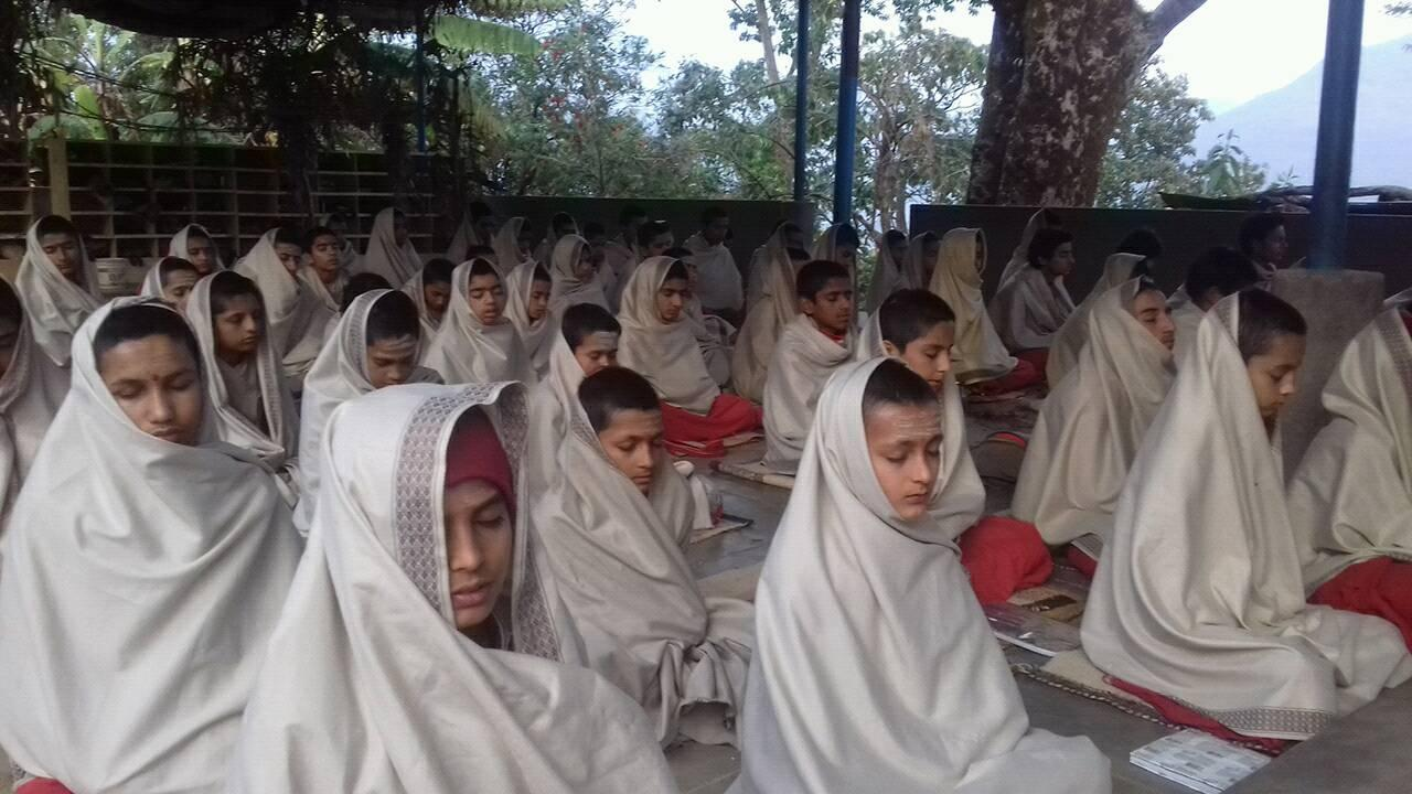 नेपाली: चिसाखोला का विद्यार्थीहरु ध्यान गर्दै